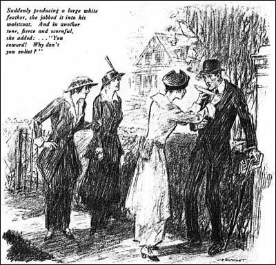 Raffigurazione di gruppo di donne che distribuisce penne bianche a uomini non arruolati